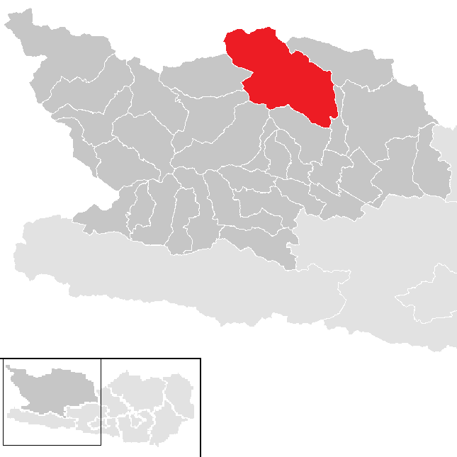 Bezirk Spittal an der Drau